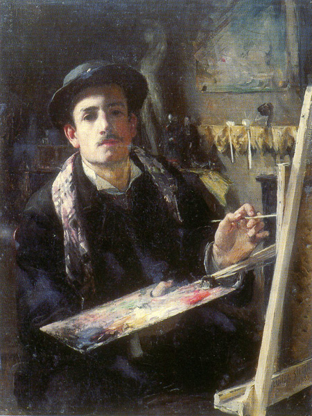 de jeunesse à l'académie Julian